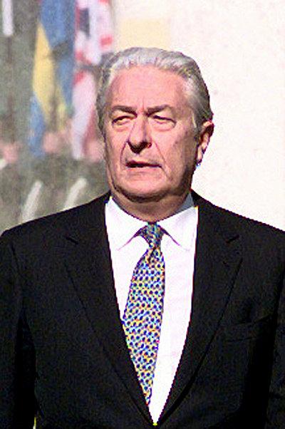 Sergio Balanzino (NATO Deputy Secretary General) in Sarajewo